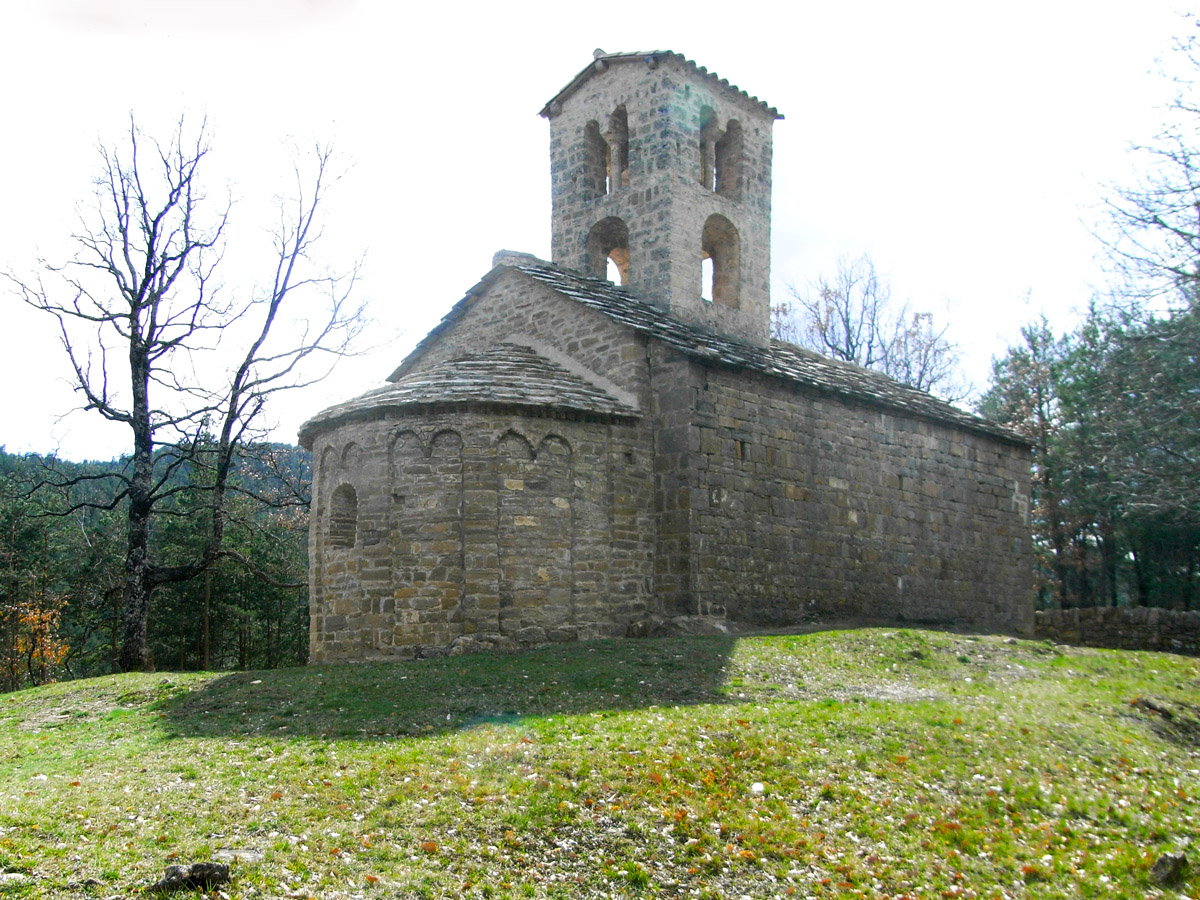 Sant Sadurní de Rotgers, a Borredà